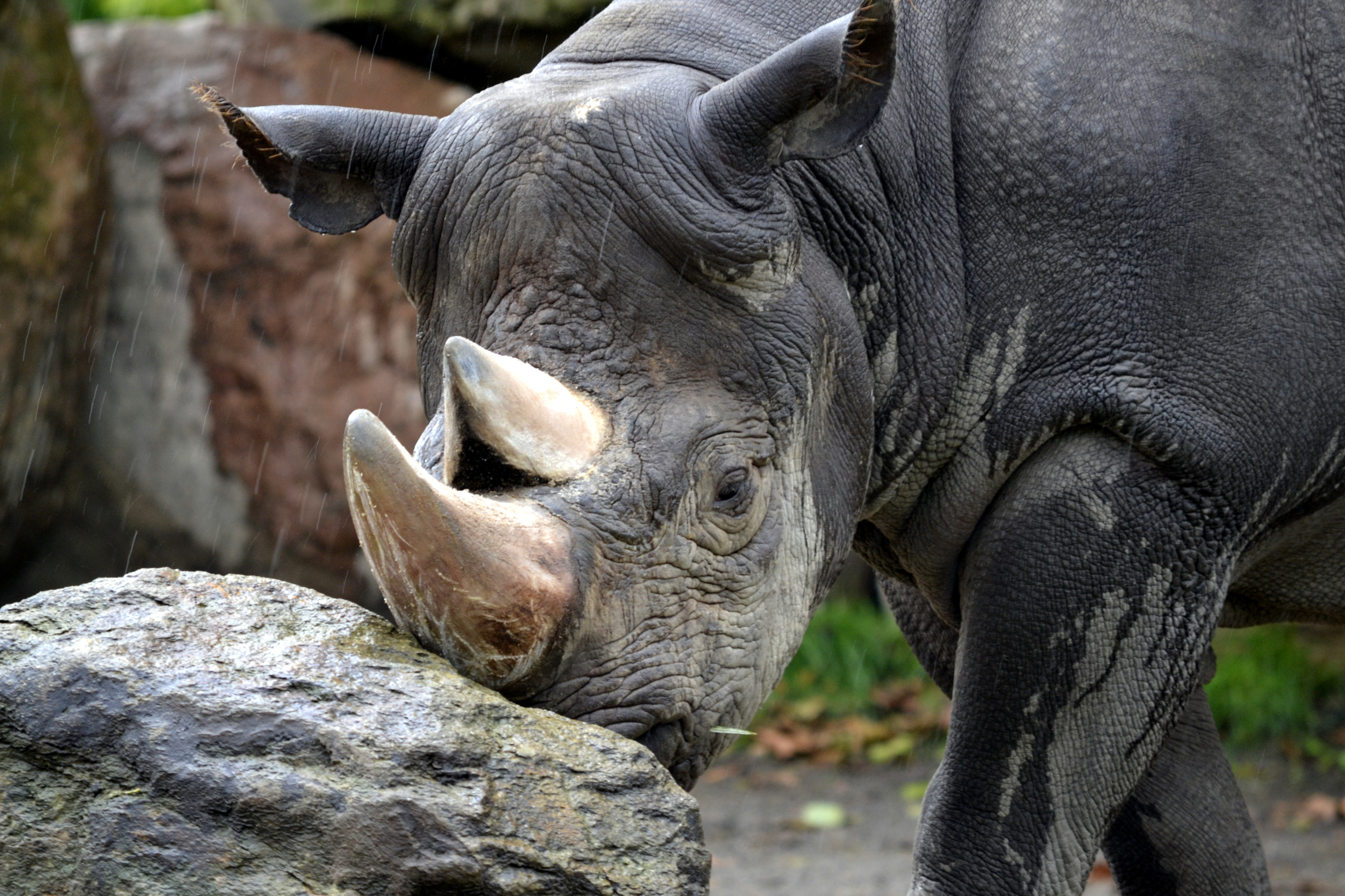 Deze foto is gemaakt tijdens een bezoek aan Diergaarde Blijdorp (Rotterdam, Nederland). This picture was taken during a visit to Rotterdam Zoo (Rotterdam, Netherlands).